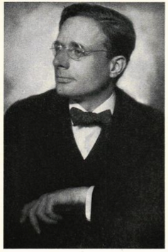 Fritz Stiedry